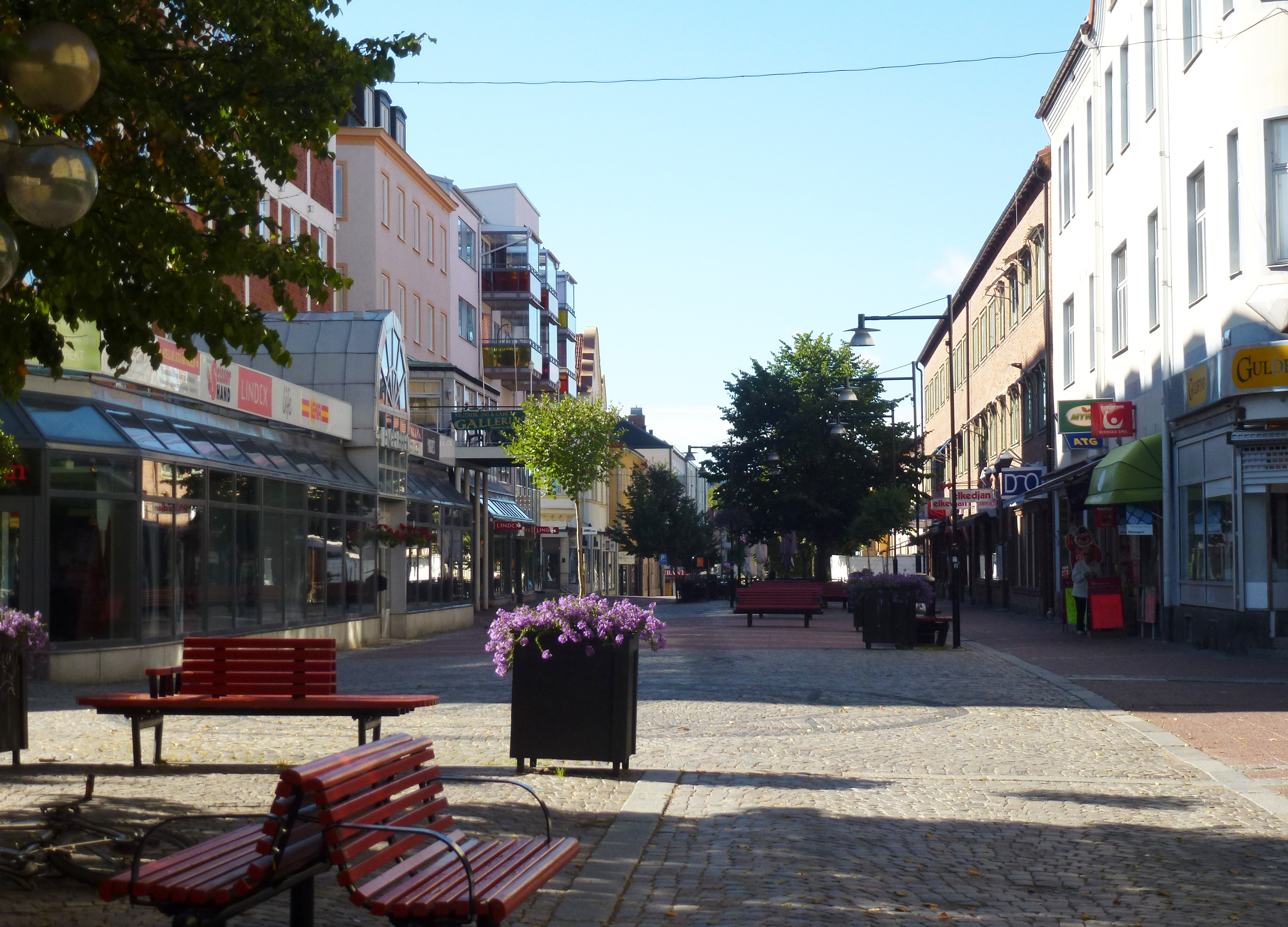 Ludvika Storgatan med Engelbrektgallerian t.v.